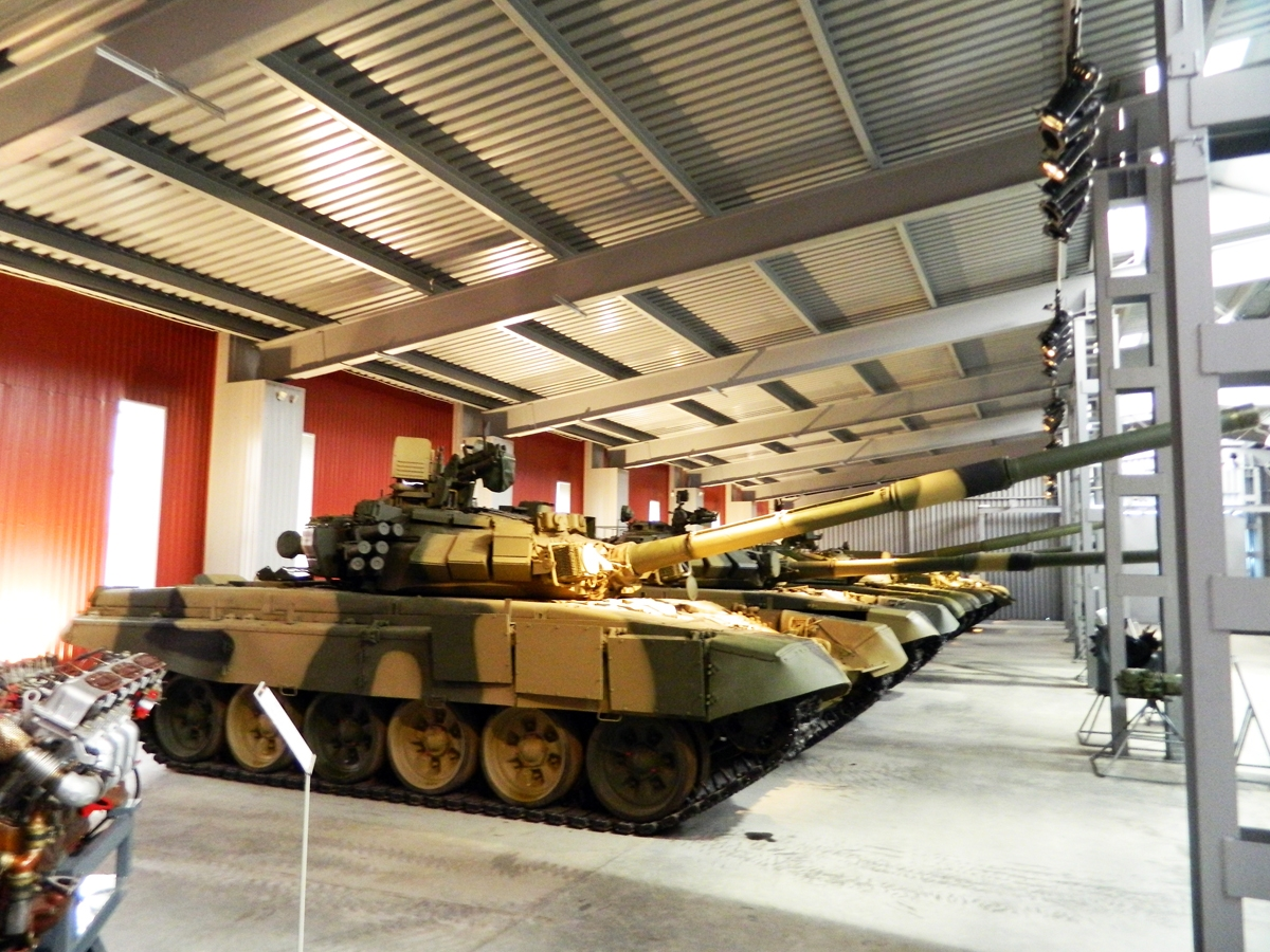 Музей бронетанковой техники (Нижний Тагил). Экспозиция современных танков